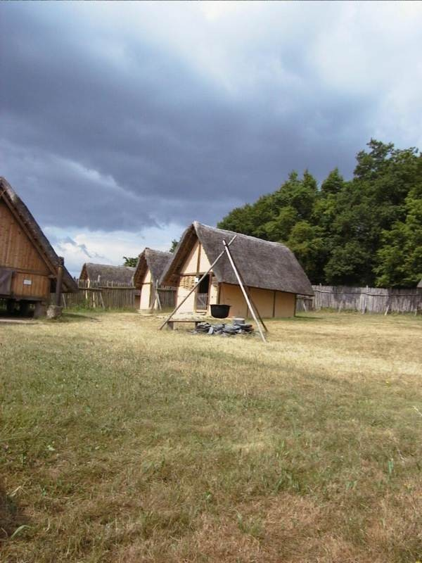 Keltische Burganlage "Altburg" bei Bundenbach im Hunsrück. Selbst fotografiert, gemeinfrei